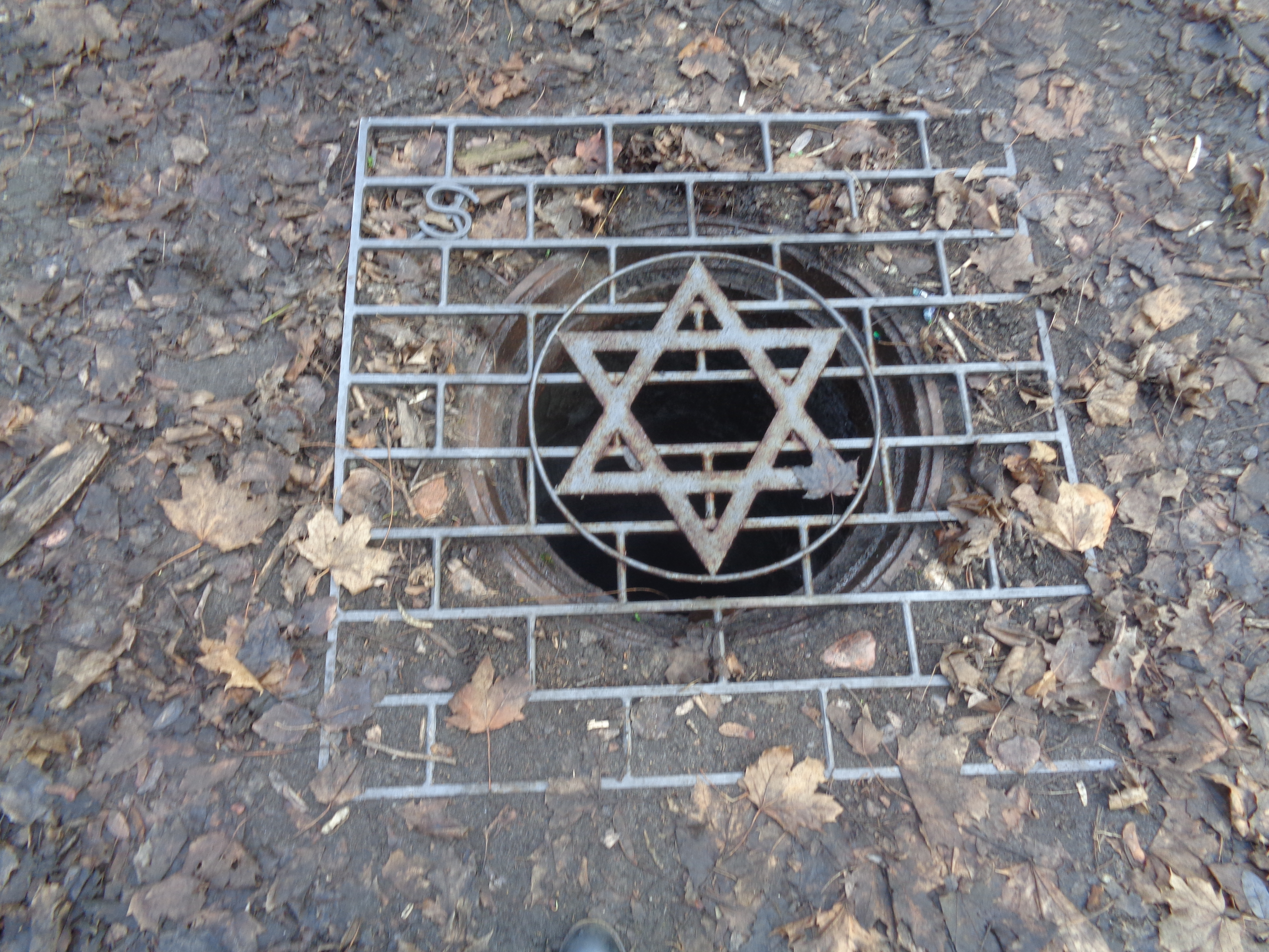 Kanał komunikacyjny na cmentarzu Żydowskim